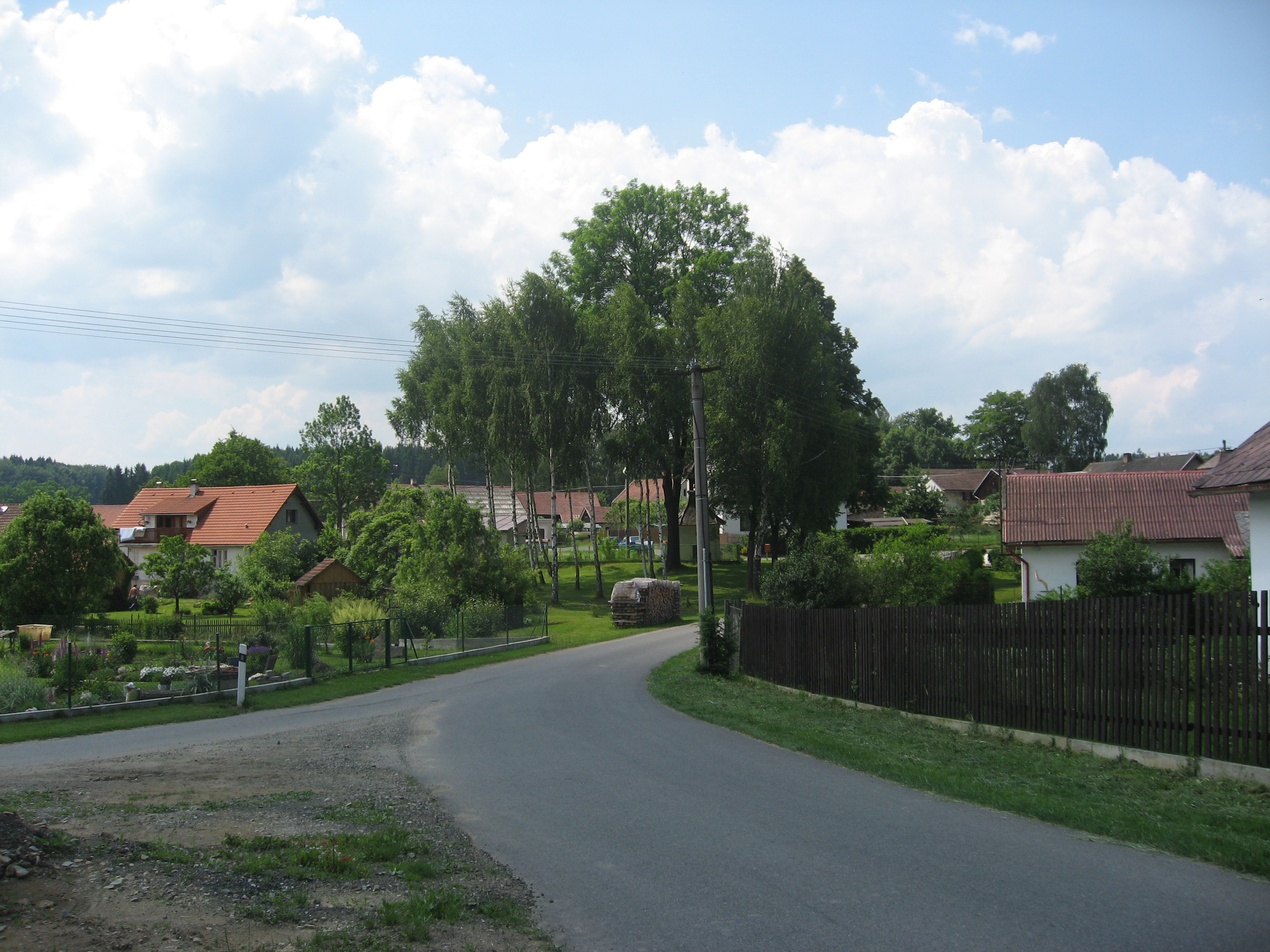 Bystrá